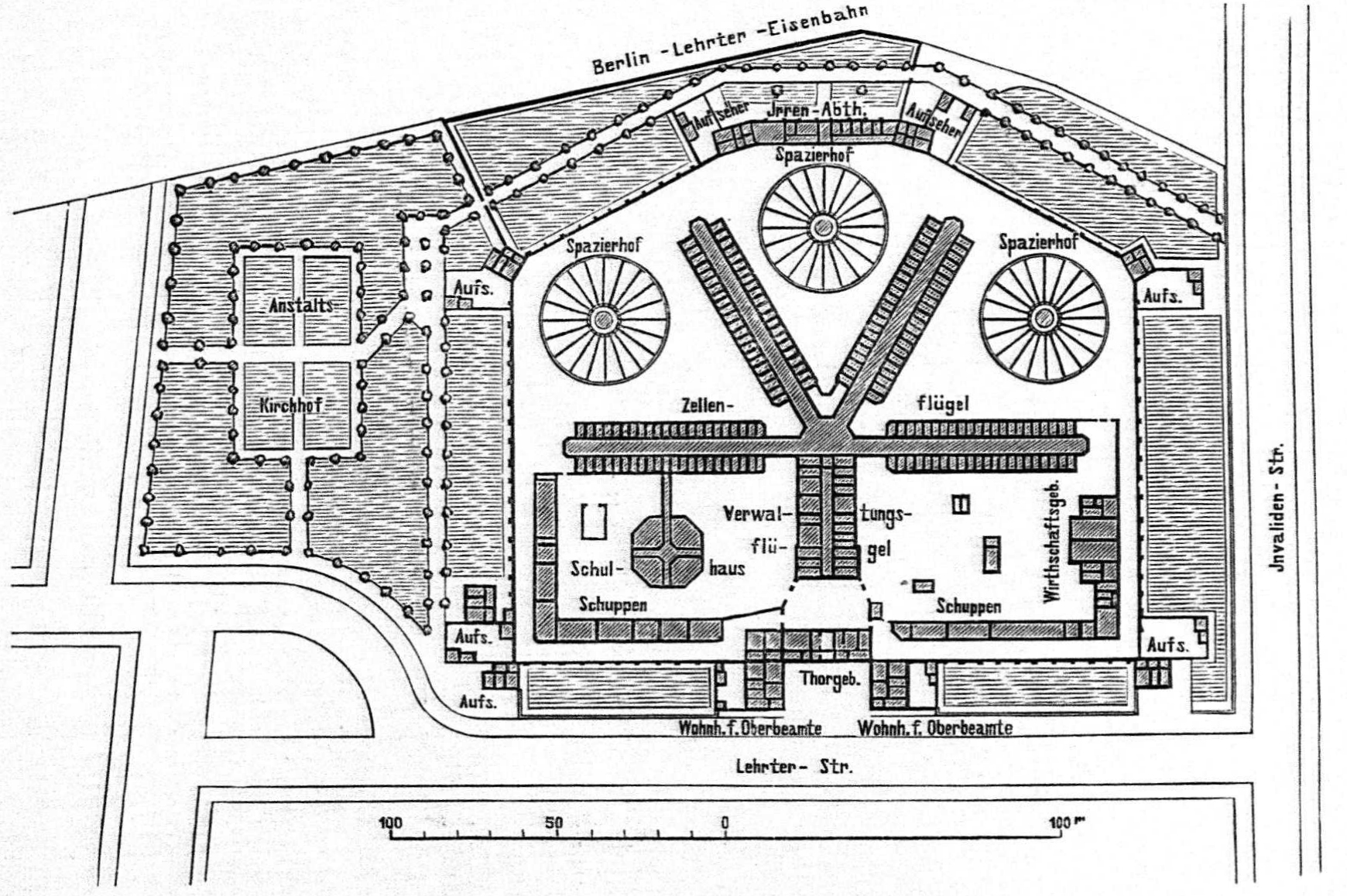 Lageplan des Zellengefängnisses in Berlin-Moabit von 1896.